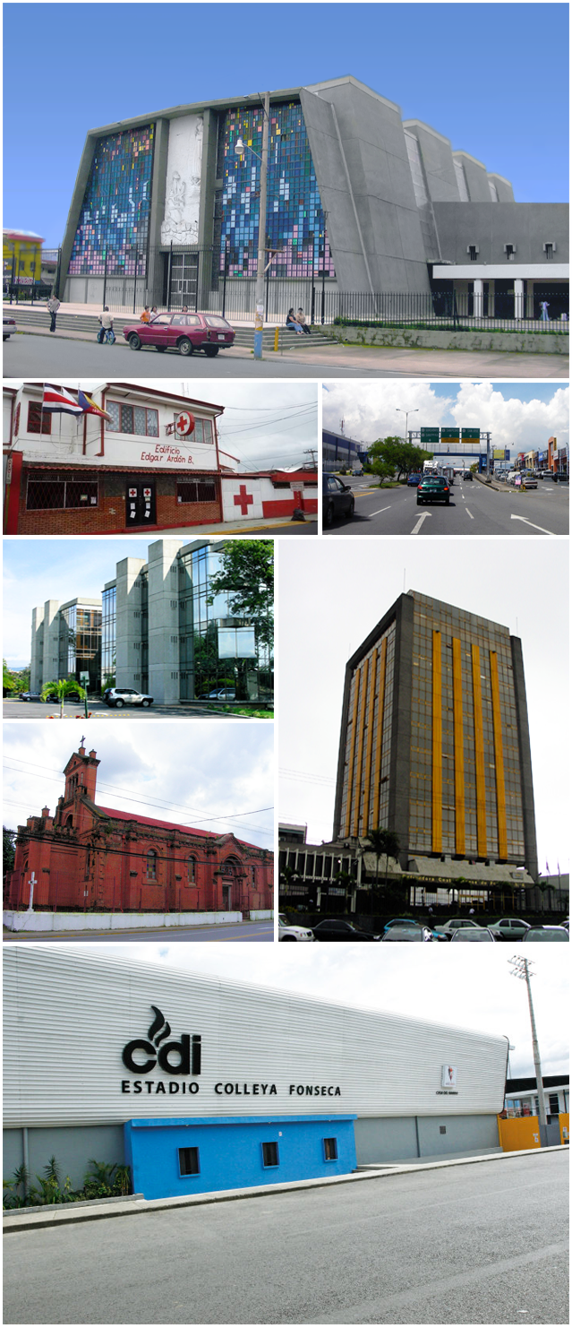 Collage con imágenes de los puntos más representativos del cantón de Goicoechea, Costa Rica.